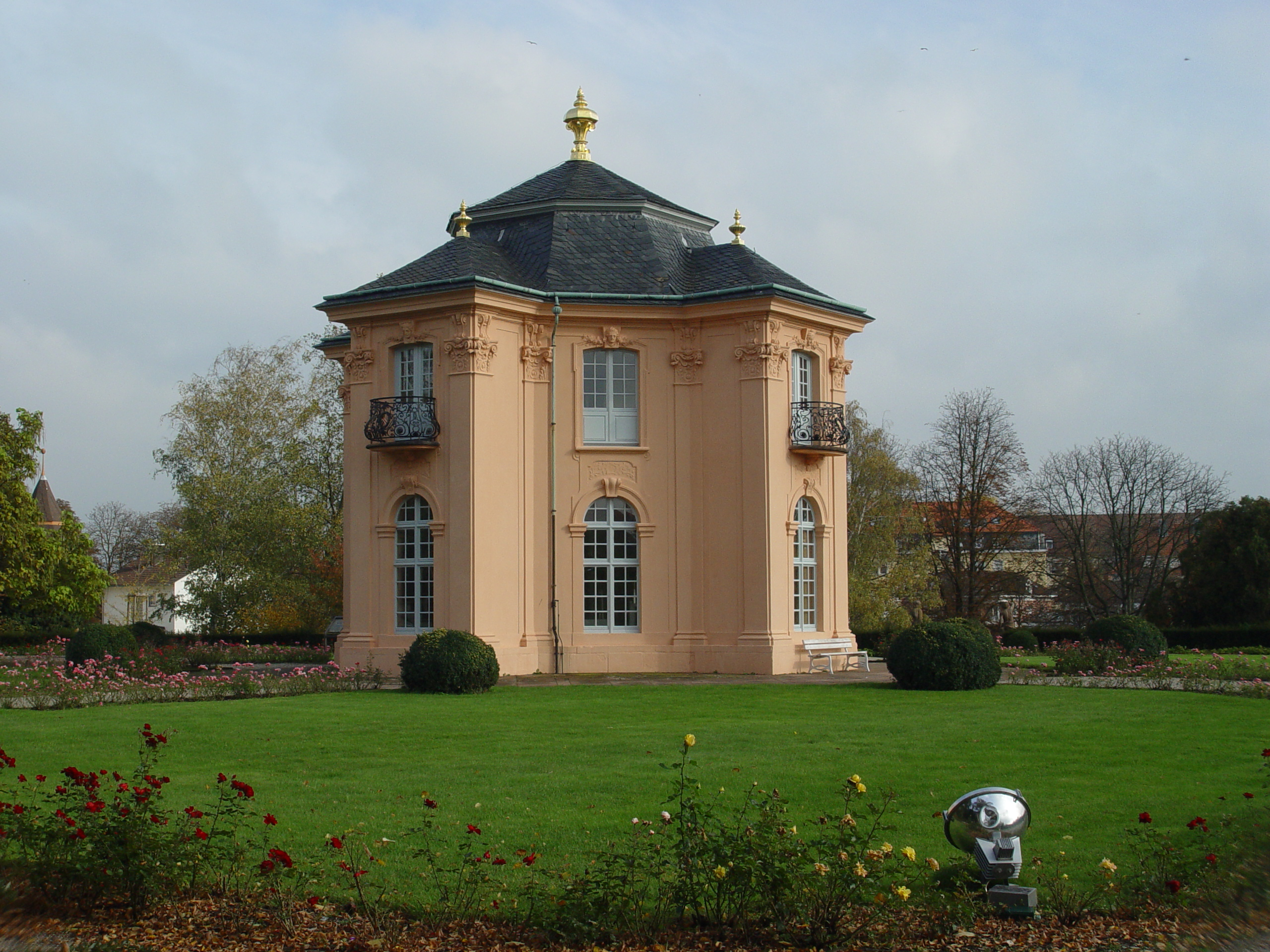 Die Pagodenburg ist ein Gartenschlösschen von Johann Michael Ludwig Rohrer aus dem Jahre 1722 in Rastatt. Im Jahre 1722 lies die Markgräfin Franziska Sibylla Augusta von ihrem Hofbaumeister Johann Michael Ludwig Rohrer einen Pavillon in Rastatt errichten. Der Pavillon wurde hierbei nach dem Vorbild des barocken Pavillons im Nymphenburger Garten in München erbaut. Franziska Sibylla Augusta nutzte den mitten in einem Garten liegenden Pavillon als Teehaus. Heute dient der Pavillon als Ausstellungsort von lokalen Künstlern.